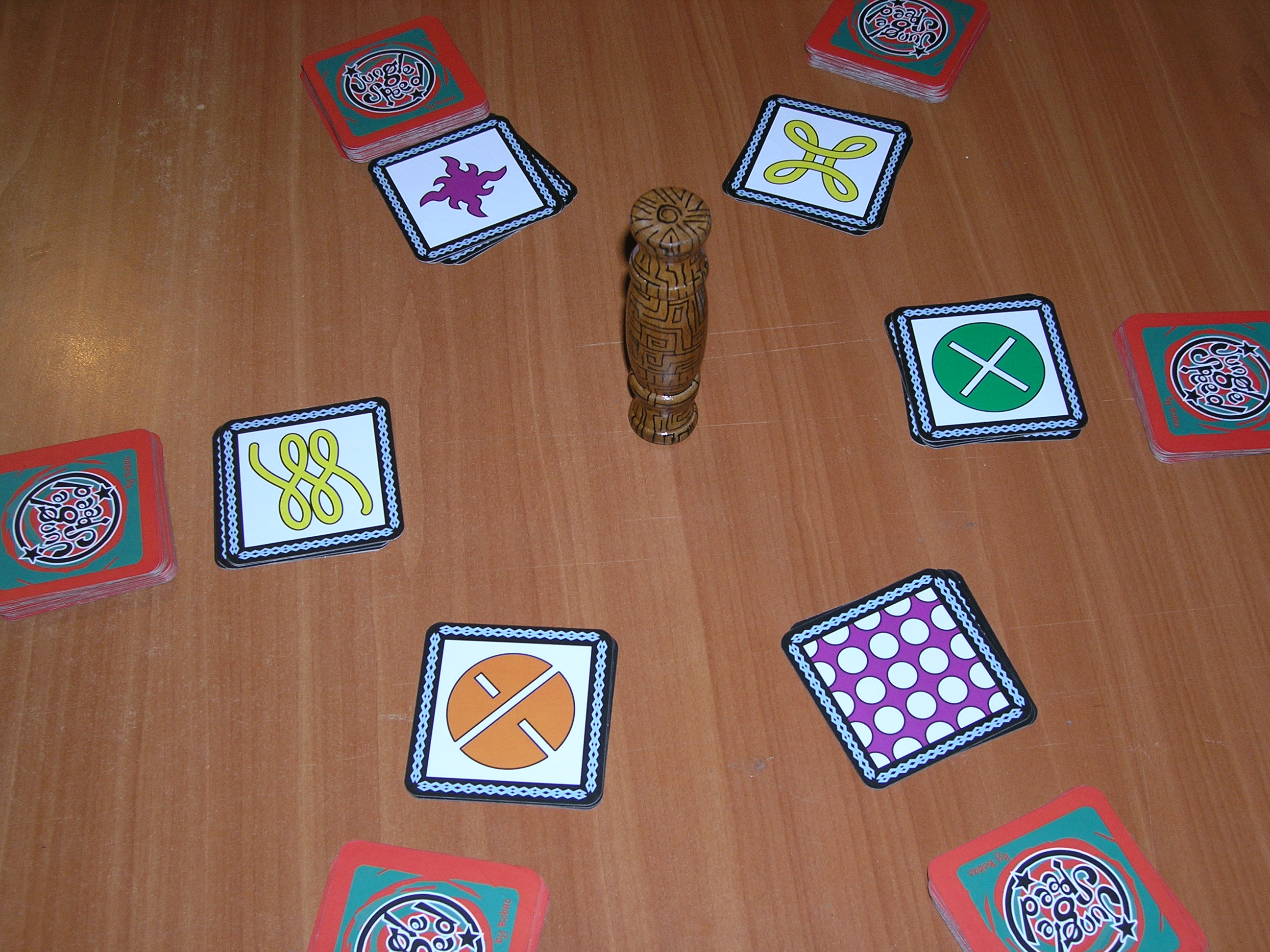 Autor ja Slomar33 (разговор) 15:58, 12. јануар 2011. (CET) malo pre sam slikao karte na svom stolu za clanak o istim kartama Licensing